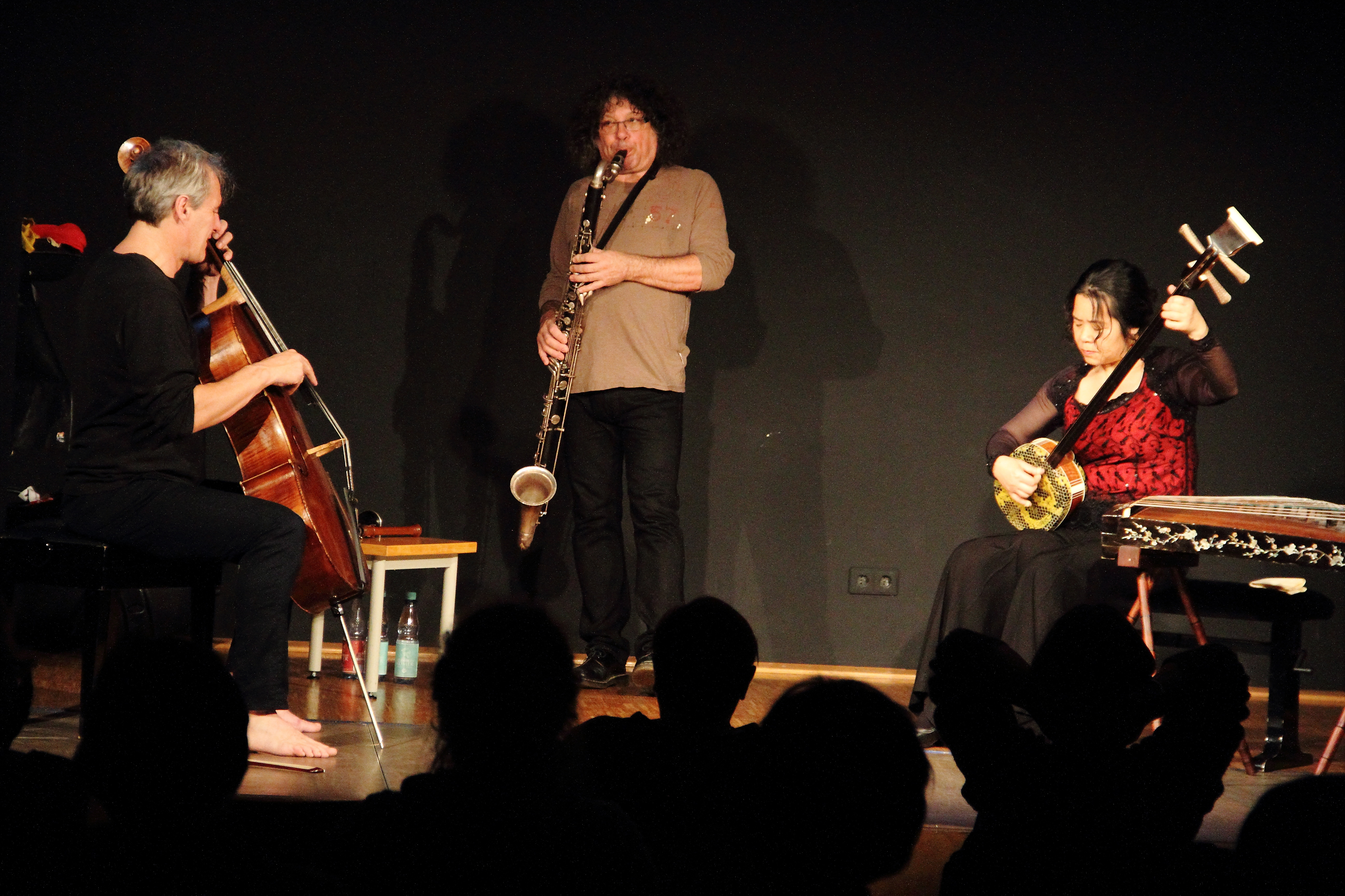 Das East-West Trio im KULT Niederstetten. Das frei improvisierende Trio besteht aus Xu Fengxia (guzheng, sanxian, voc), Didier Petit (cello) & Sylvain Kassap (cl).